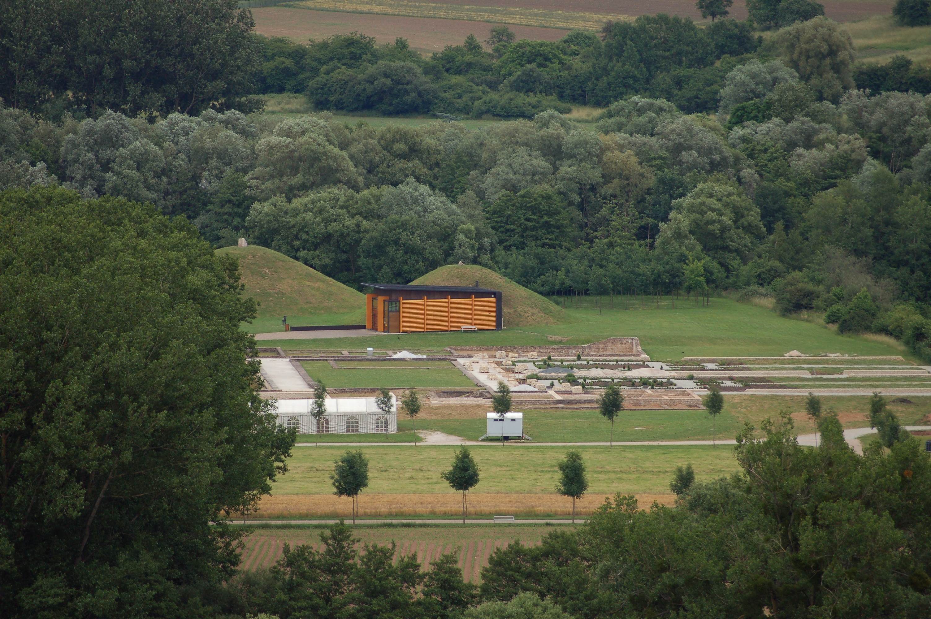 Blick auf das Hügelgrab der Keltenfürstin im Europäischen Kulturpark Bliesbruck-Reinheim.